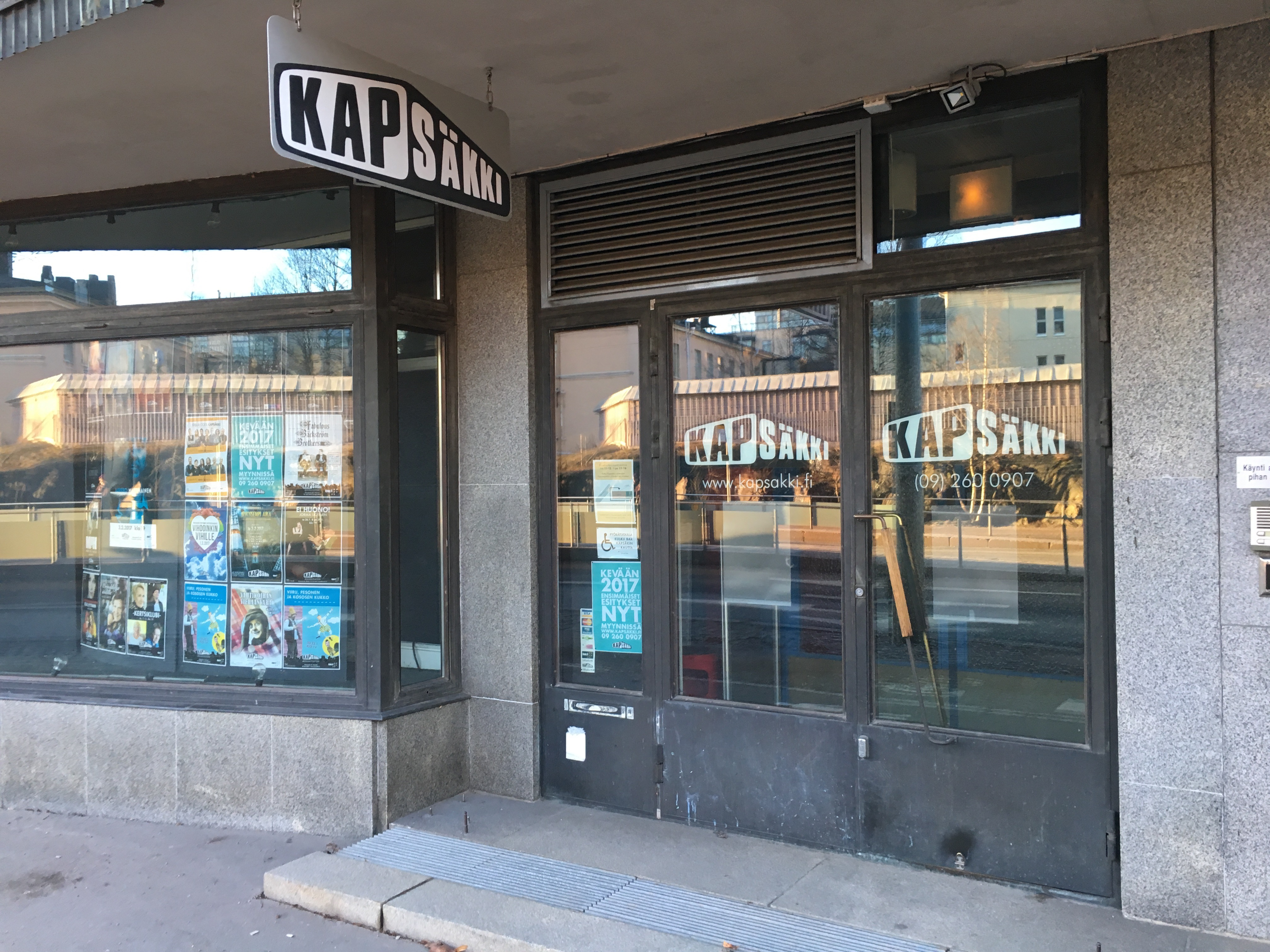 Teatteri Kapsäkki, Hämeentie, Helsinki